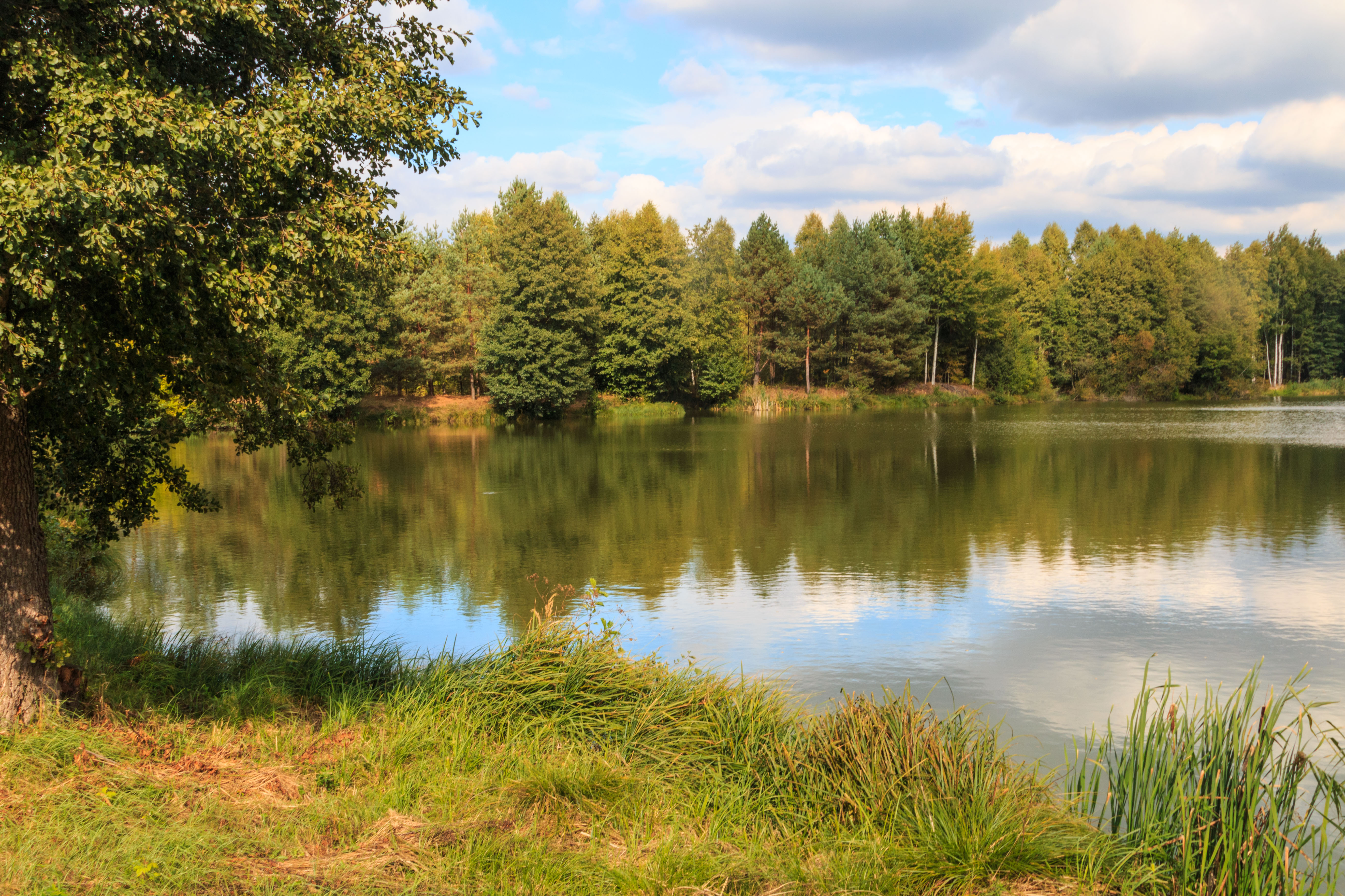 Novodvorský rybník u Hvězdova Project: Vodstvo.